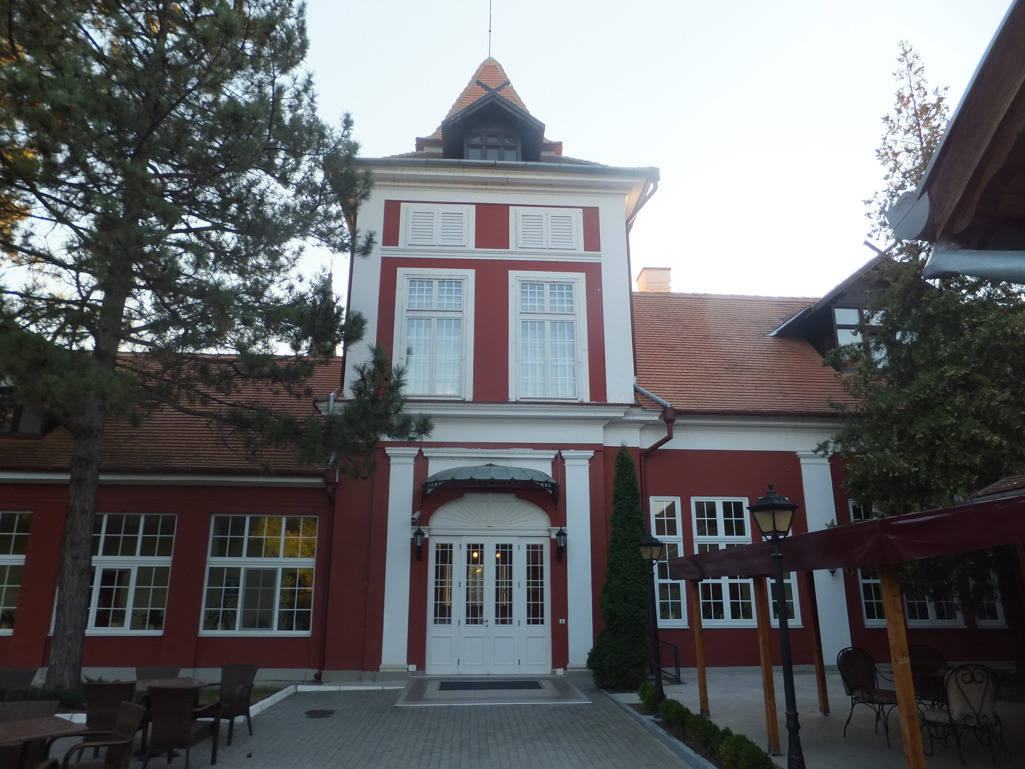 Дворац „Каштел“ у Ечки